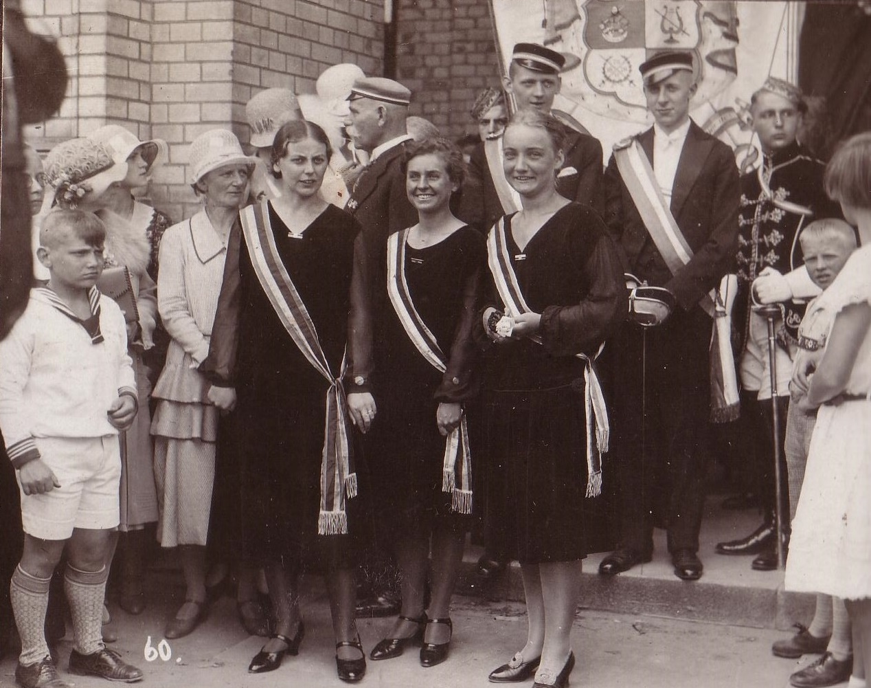 Fotografie der Chargierten der Bundes deutscher Studentinnen Regiomontana, dahinter die Chargierten der Königsberger Burschenschaft Alemannia. Das Bild entstand nach dem Festakt zum 100-jährigen Stiftungsfest des Corps Masovia in der Albertus-Universität Königsberg.